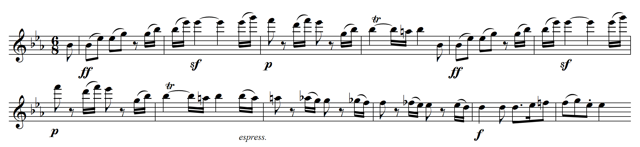 Notenbeispiel zum Hauptthema 3. Satz des Klavierkonzerts Nr. 5 von Beethoven